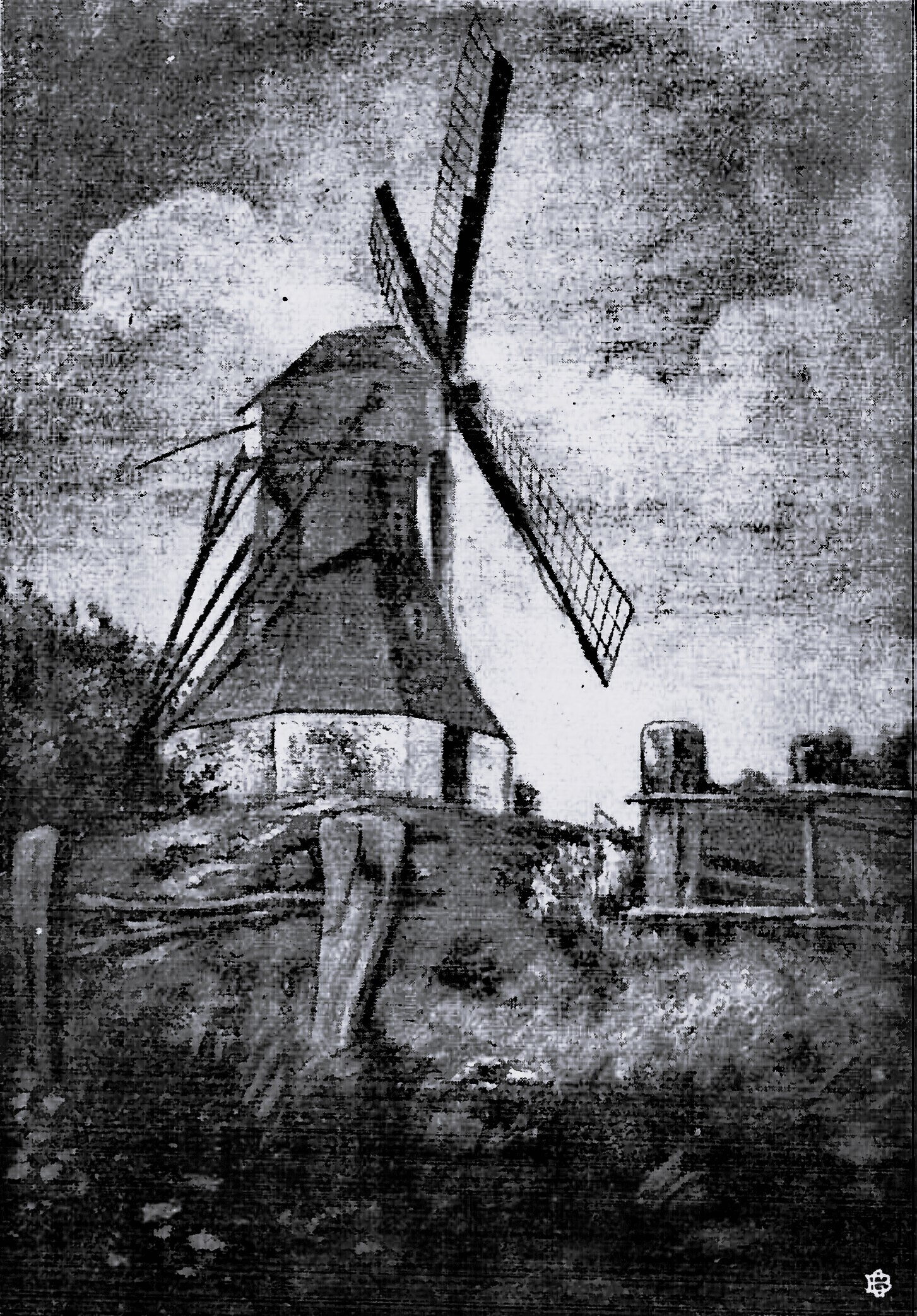 Mühle in Graal. Gemälde von v. Lütgendorff.